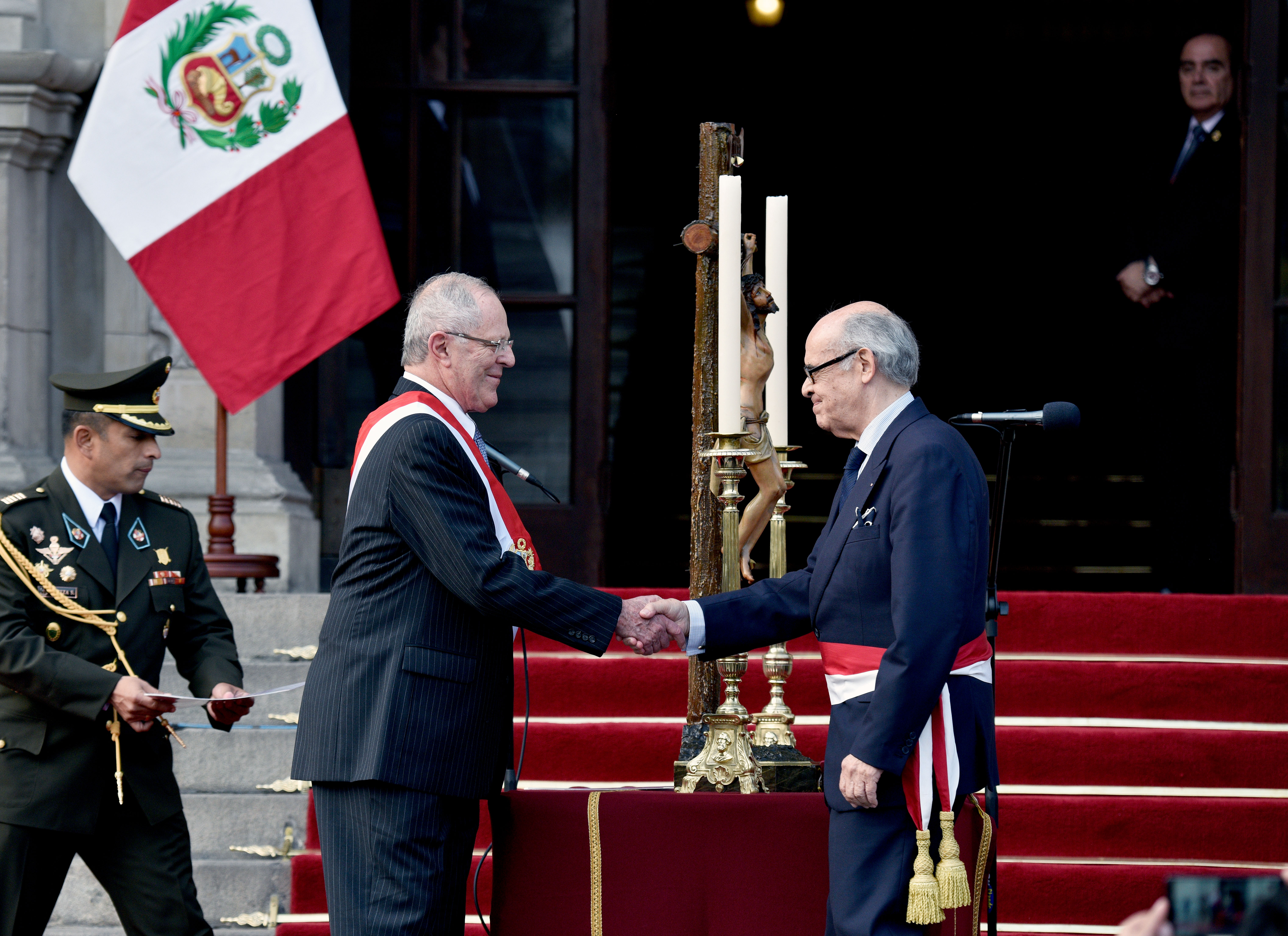 Presidente de la República Pedro Pablo Kuczynski tomó juramento al nuevo Canciller, Embajador Ricardo Luna Mendoza.